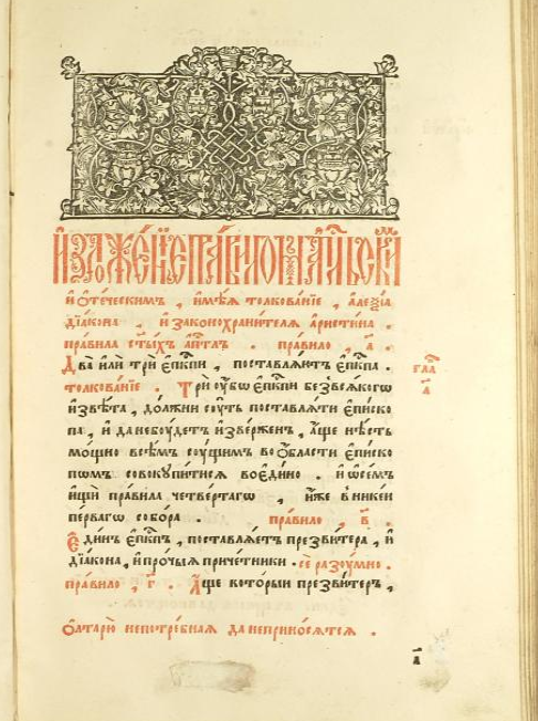 Изложение правилом апостольским. Кормчая 1653 год